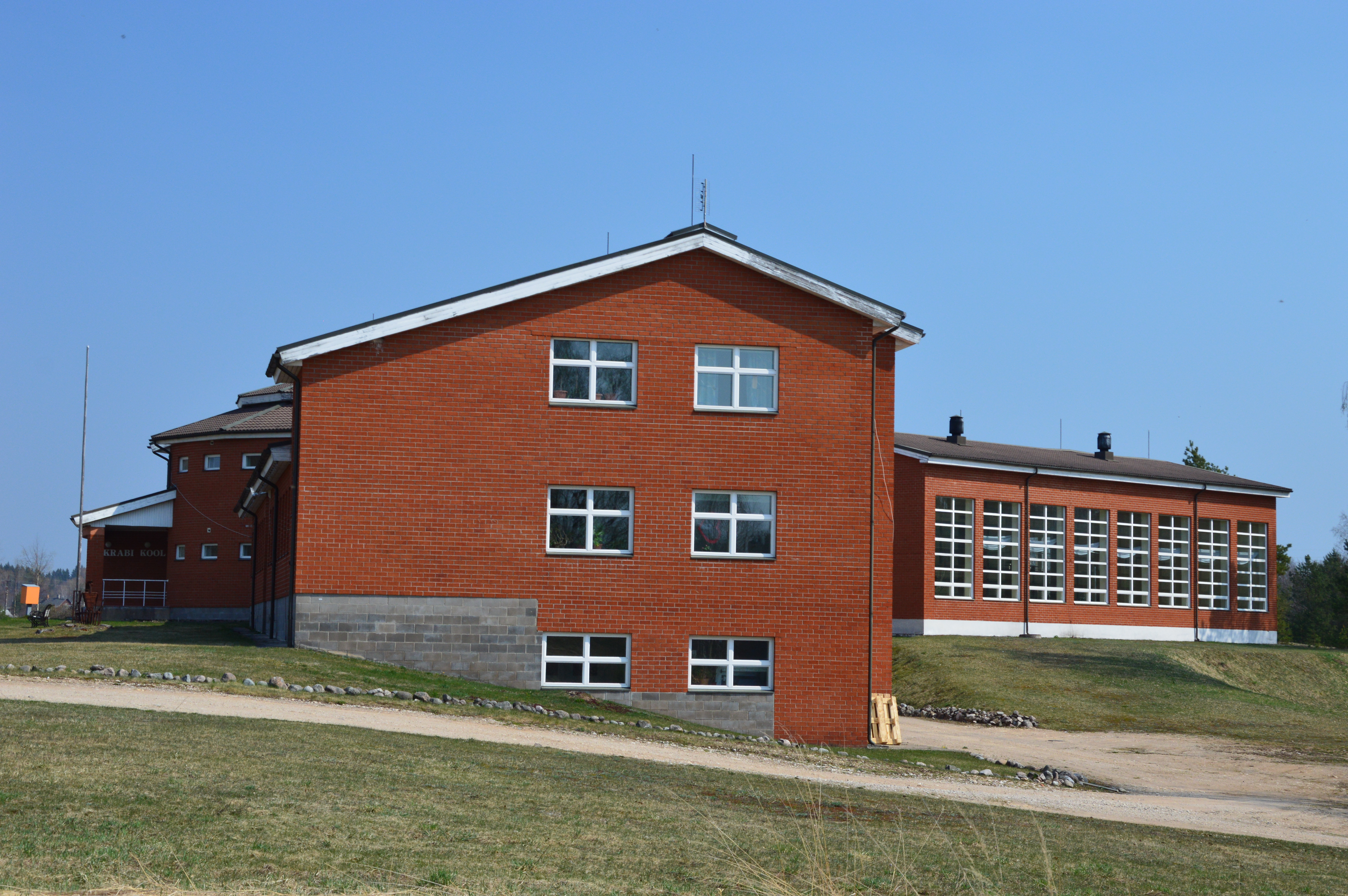 Krabi kool